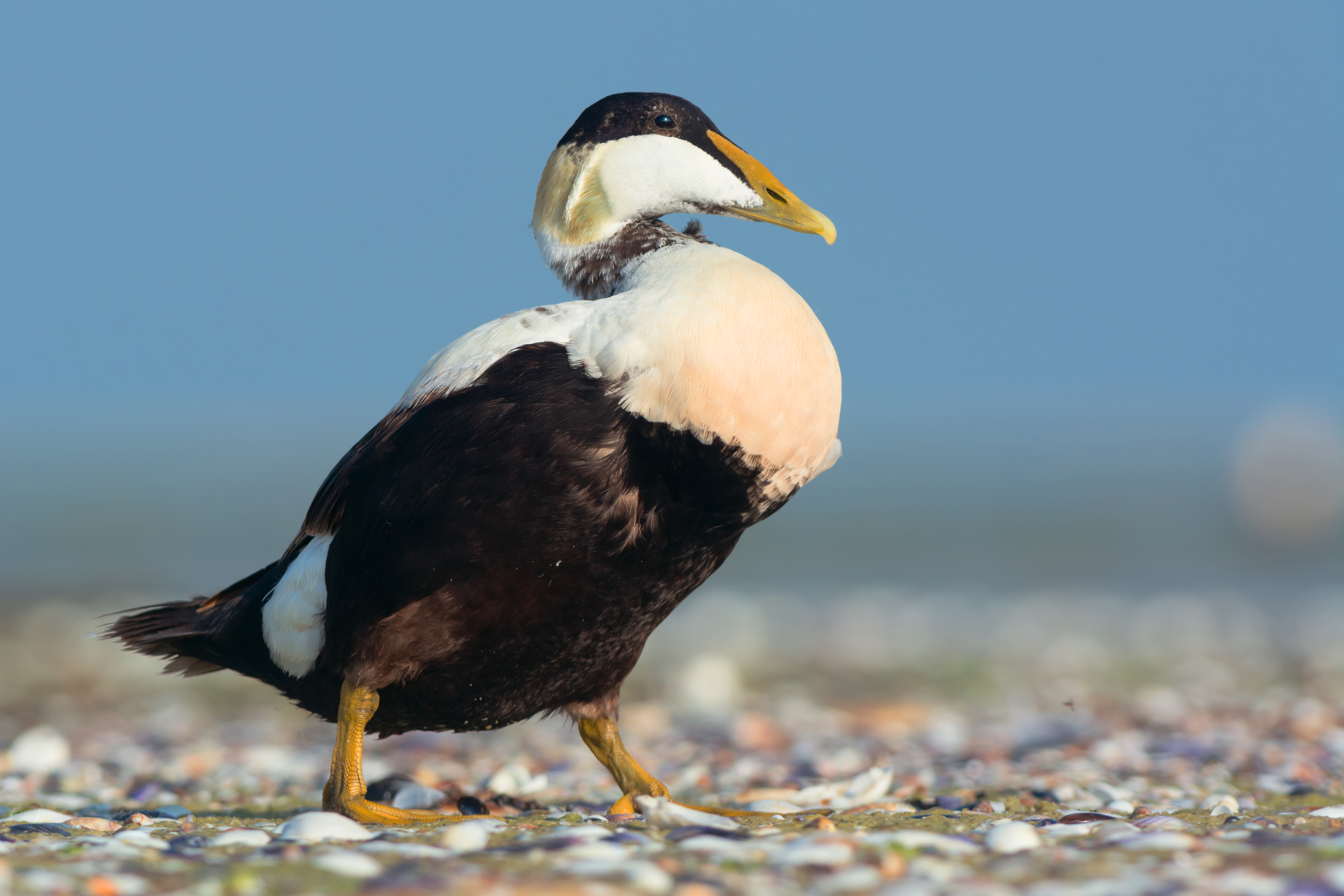 Береги Кінбурнського півоострова є улюбленним місцем відпочинку (до недавна і гнуздування) рідкісних качок пухівок.